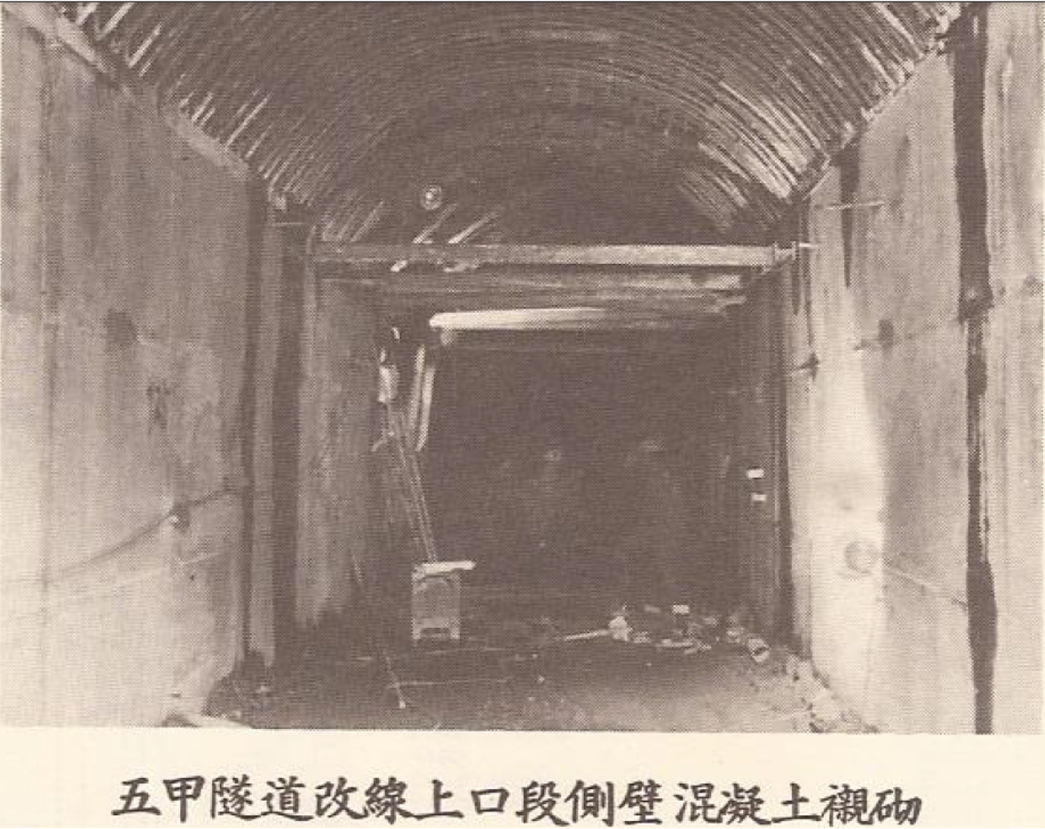 五甲隧道改線 新上口施工過程